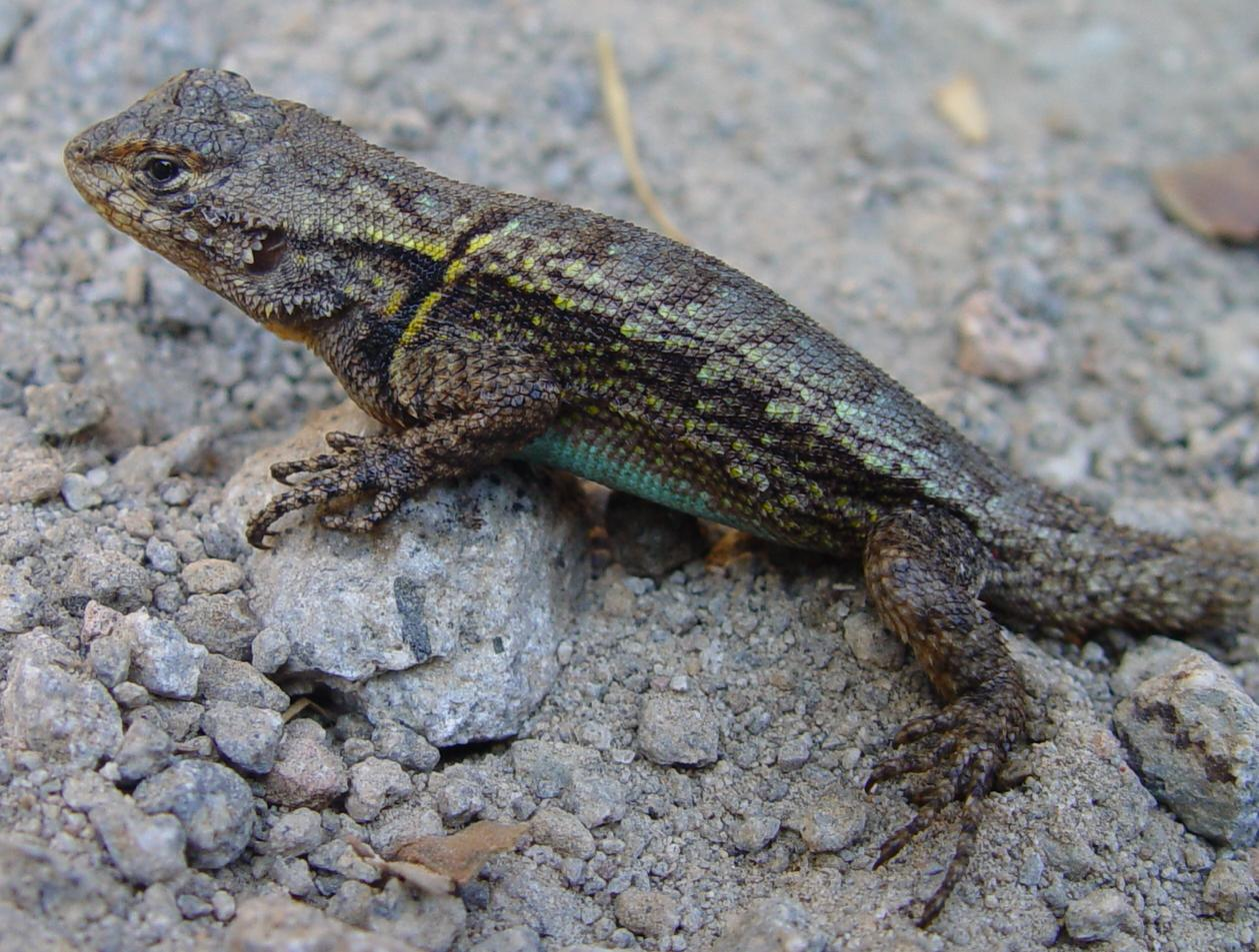 S. grammicus male